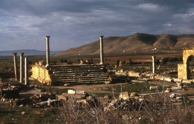 Ruines romaines de Thuburbo Majus, Tunisie - Temple de Baalat, première moitié du IIIe siècle ap. J.-C.